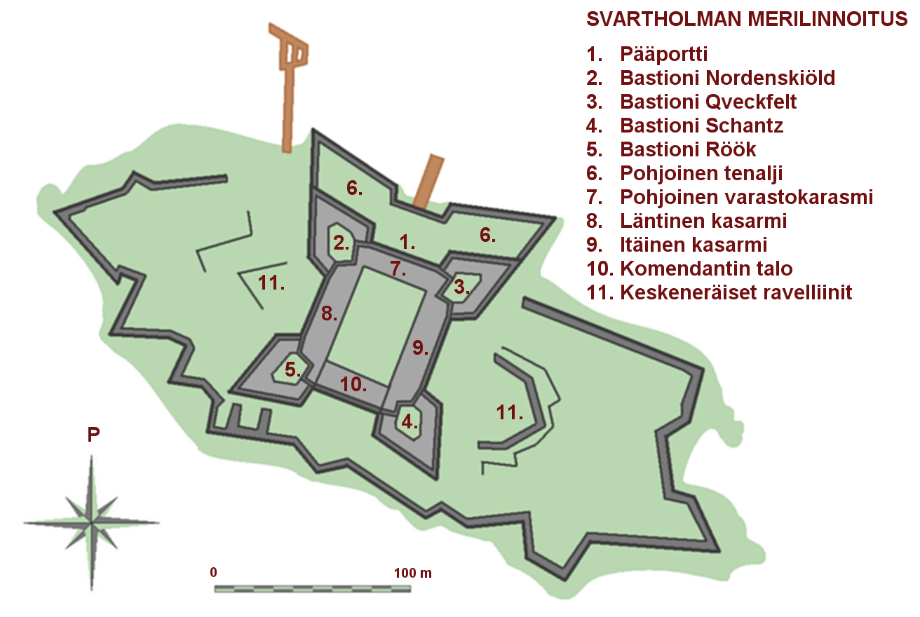 Svartholman merilinnoituksen kartta.